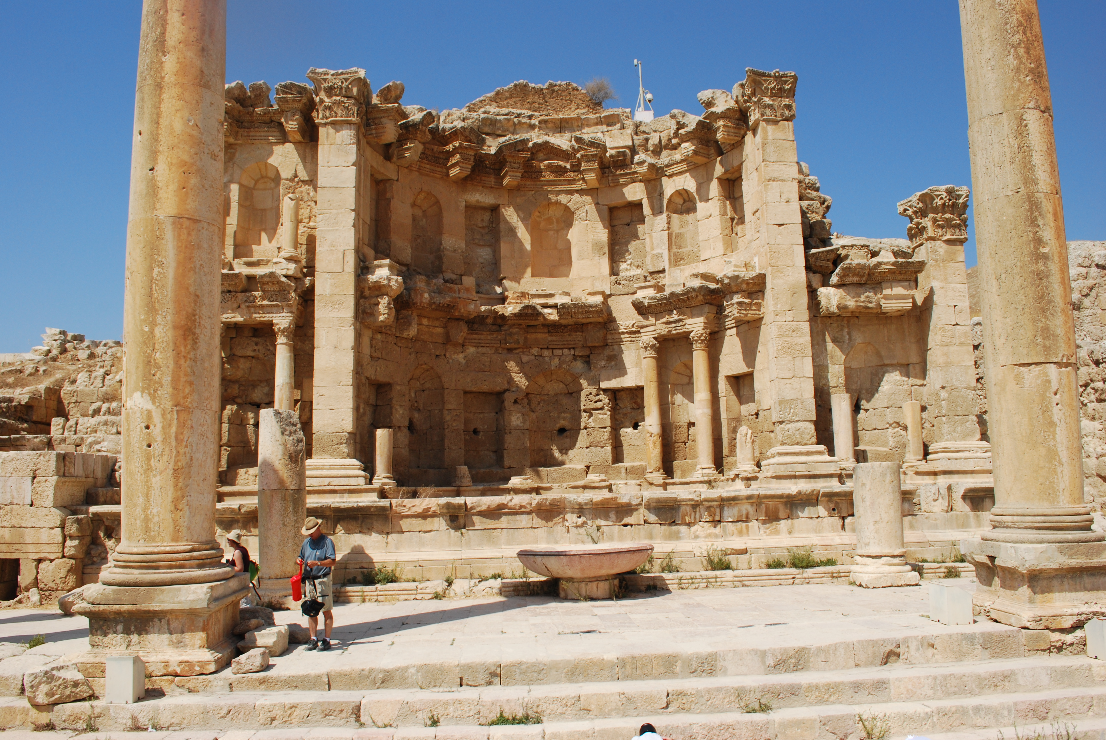 Le nymphée de Jerash.